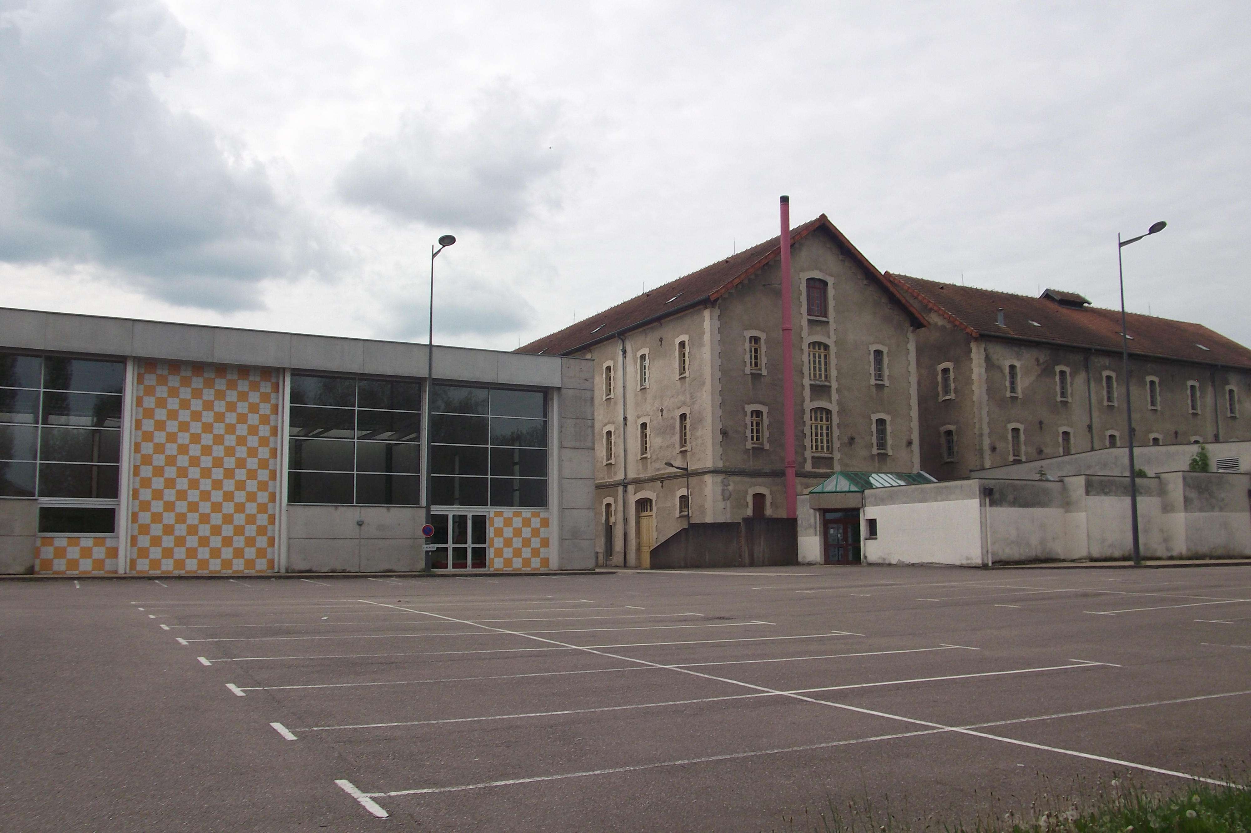 La maison des associations de Vesoul (Haute-Saône, Franche-Comté)